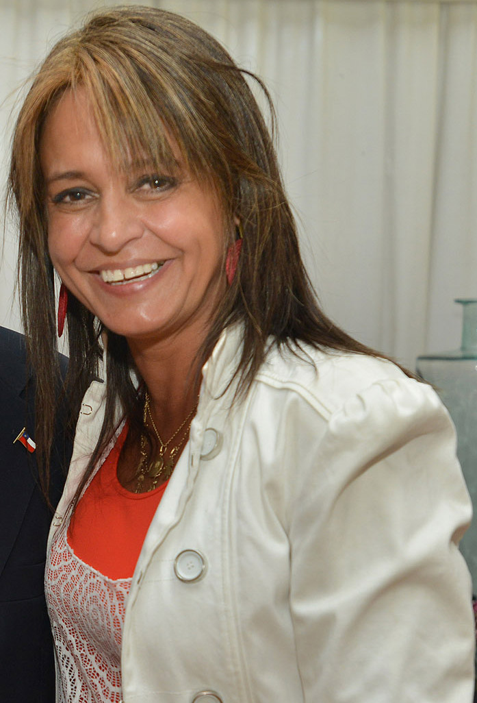 Jacqueline van Rysselberghe, política chilena.